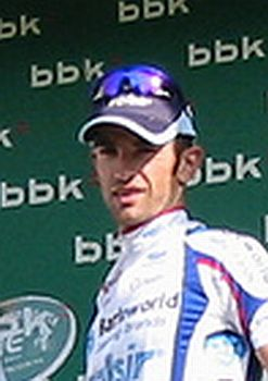 Pedro Arreitunandia (Barloworld) Primer Euskaldun de la etapa. - Pedro Arreitunandia (Barloworld) Etapako lehen euskalduna. Euskal Bizikleta 2005.